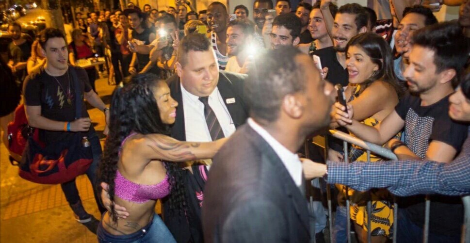 Cantora brasileira, cercada por fãs